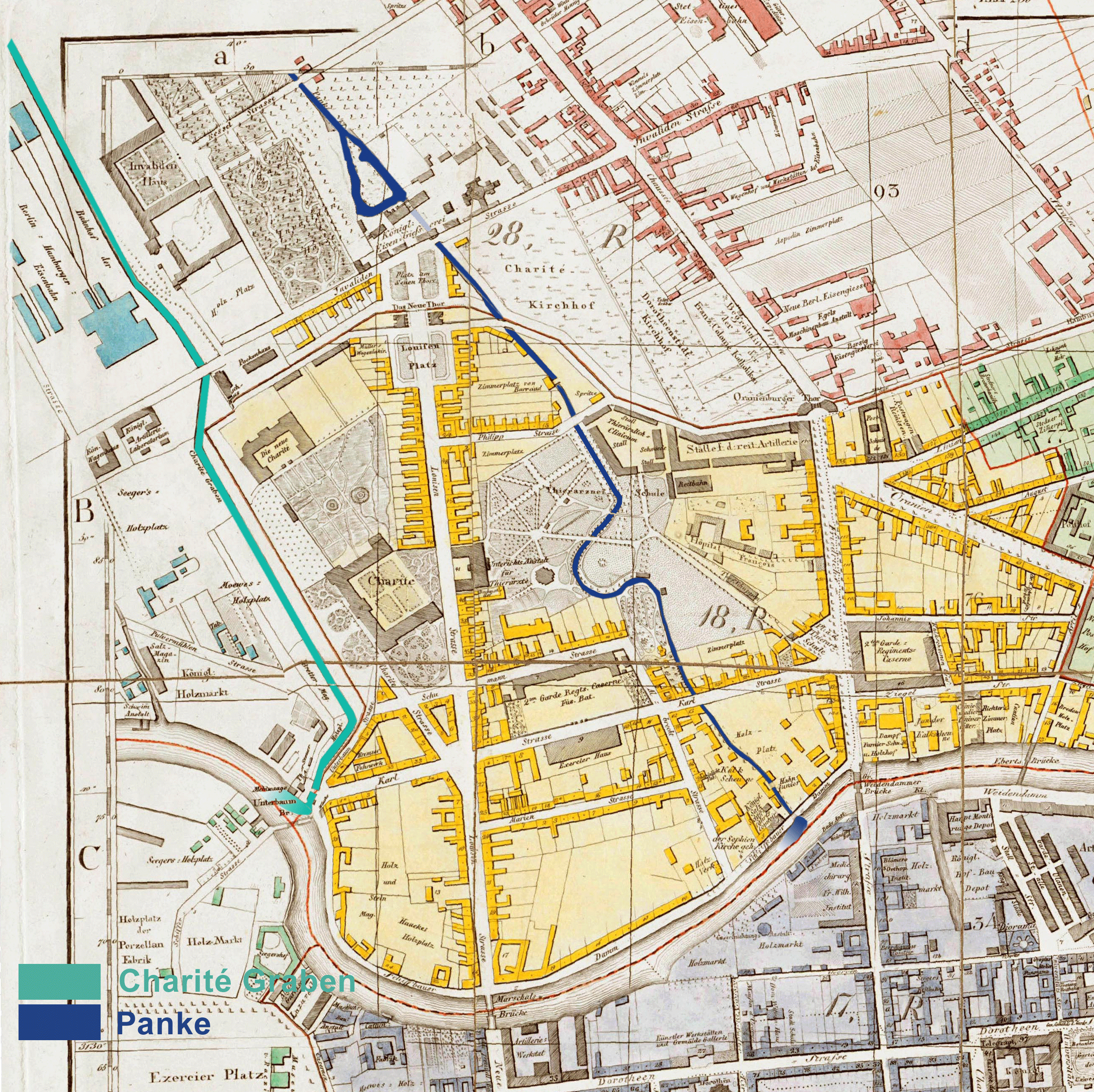 Grundriss von Berlin Aufgenommen und gezeichnet mit Genehmigung der Königl. Academie der Wissenschaften von J.C.Selter. Im Verlage bei Simon Schropp et Comp 1846. Format: 93,5 x 70,0 cm (nur der Plan) Maßstab: 1:5.800 Orientierung: Nord Kupferstich, koloriert Planquadrate: a-p und A-H Der Titel steht rechts oben in einer ovalen Umrandung. Der Rahmen enthält Längen- und Breitengrade (nach Ferro) - die Position des alten Observatoriums auf dem Marstall ist besonders hervorgehoben. In der inneren Rahmenleiste ist ein fortlaufender Maßstab eingebettet. Links unten ist ein Rechteck eingezogen mit einer Maßstabsleiste über 150 Ruthen. Die Teilstädte sind durch unterschiedliche Farben grafisch unterschieden. In den Grundstücken sind die Hausnummer tw. eingetragen. Mit einer rot/schwarze-gestrichelten Signatur sind die 26 Polizeireviere abgegrenzt und nummeriert.